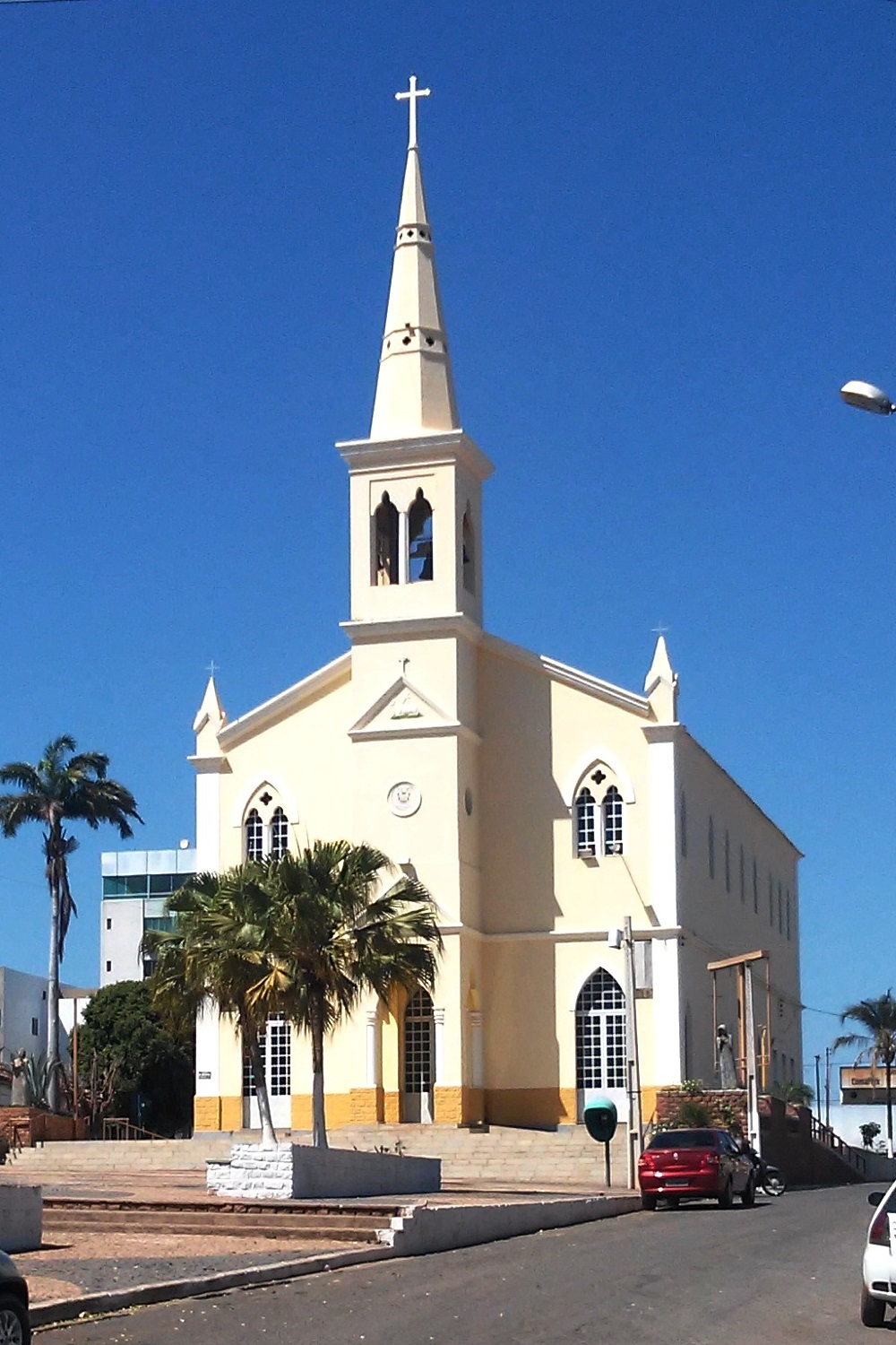 Catedral de São João Batista, sé episcopal da Diocese de Barreiras, Bahia, Brasil